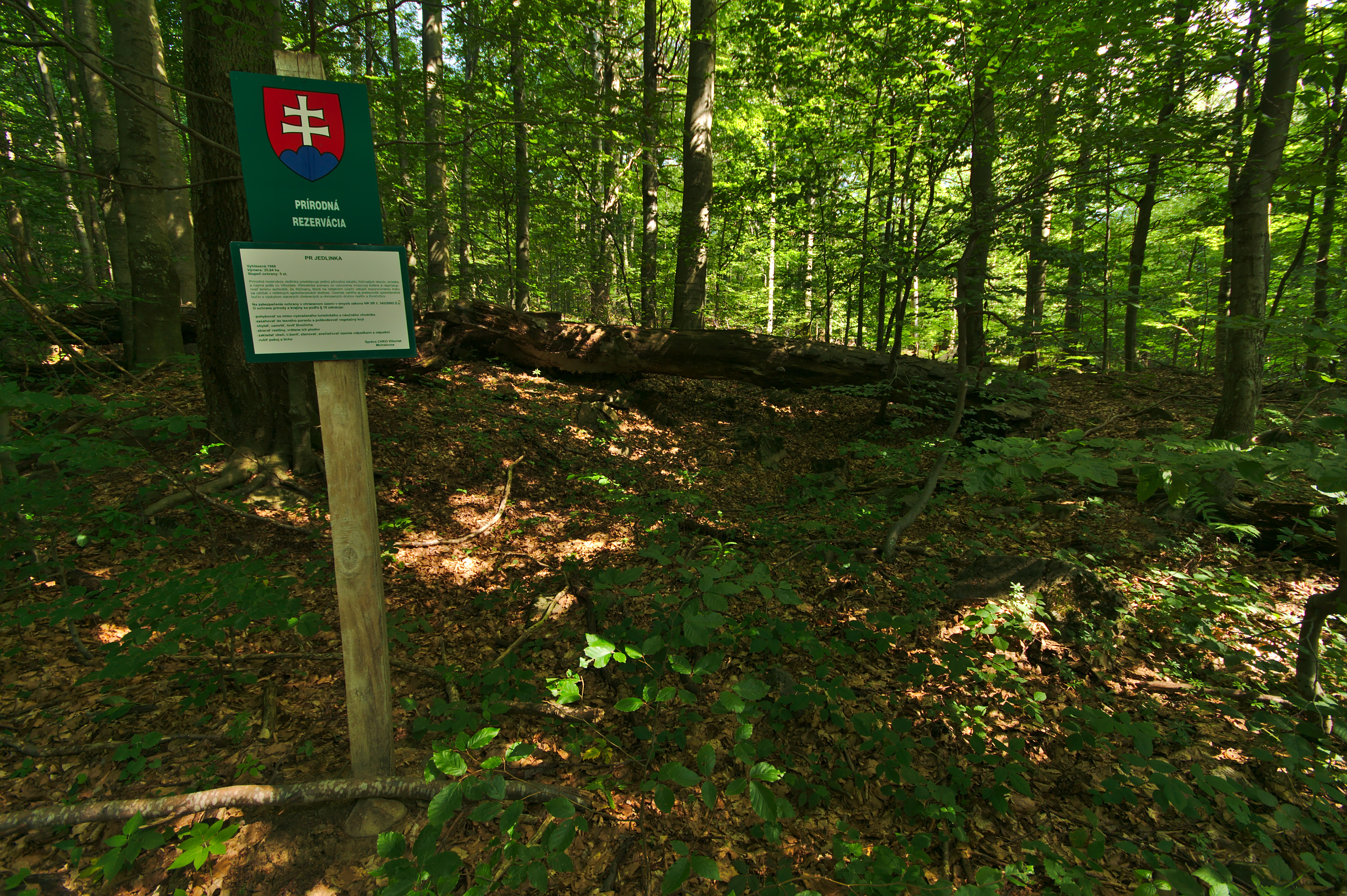 Prírodná rezervácia Jedlinka, CHKO Vihorlat